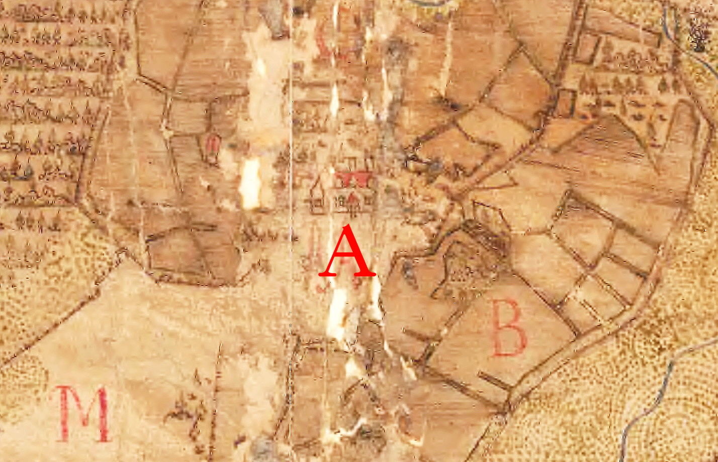 Österhaninge socken Söderby nr 1, Lådakt (norra delen). A= Huvudbyggnaden